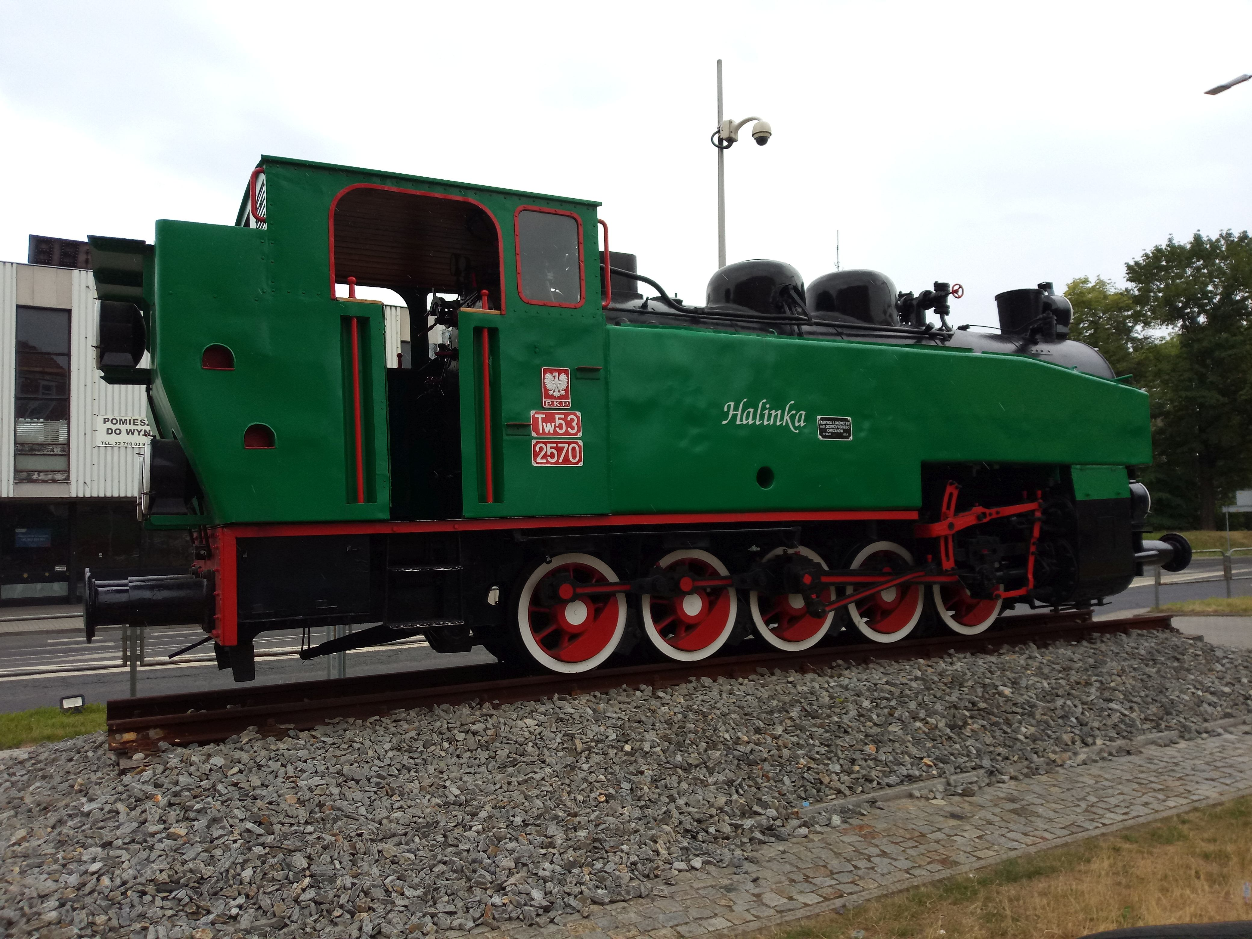 Polski tendrzak Tw53-2570 ("Halinka") po remoncie, ustawiony przed dworcem PKP w Raciborzu jako pomnik